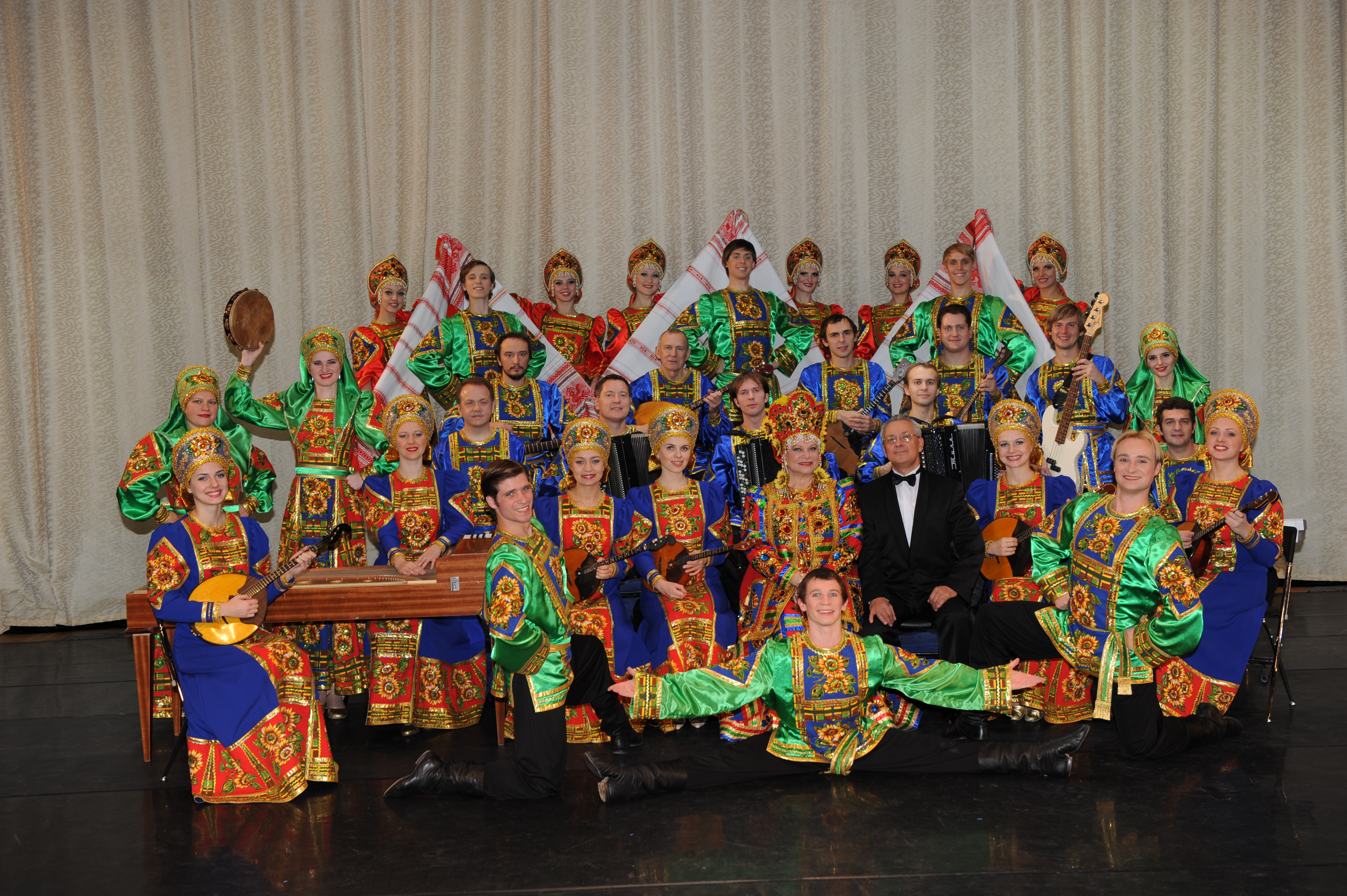 Ансамбль Русы